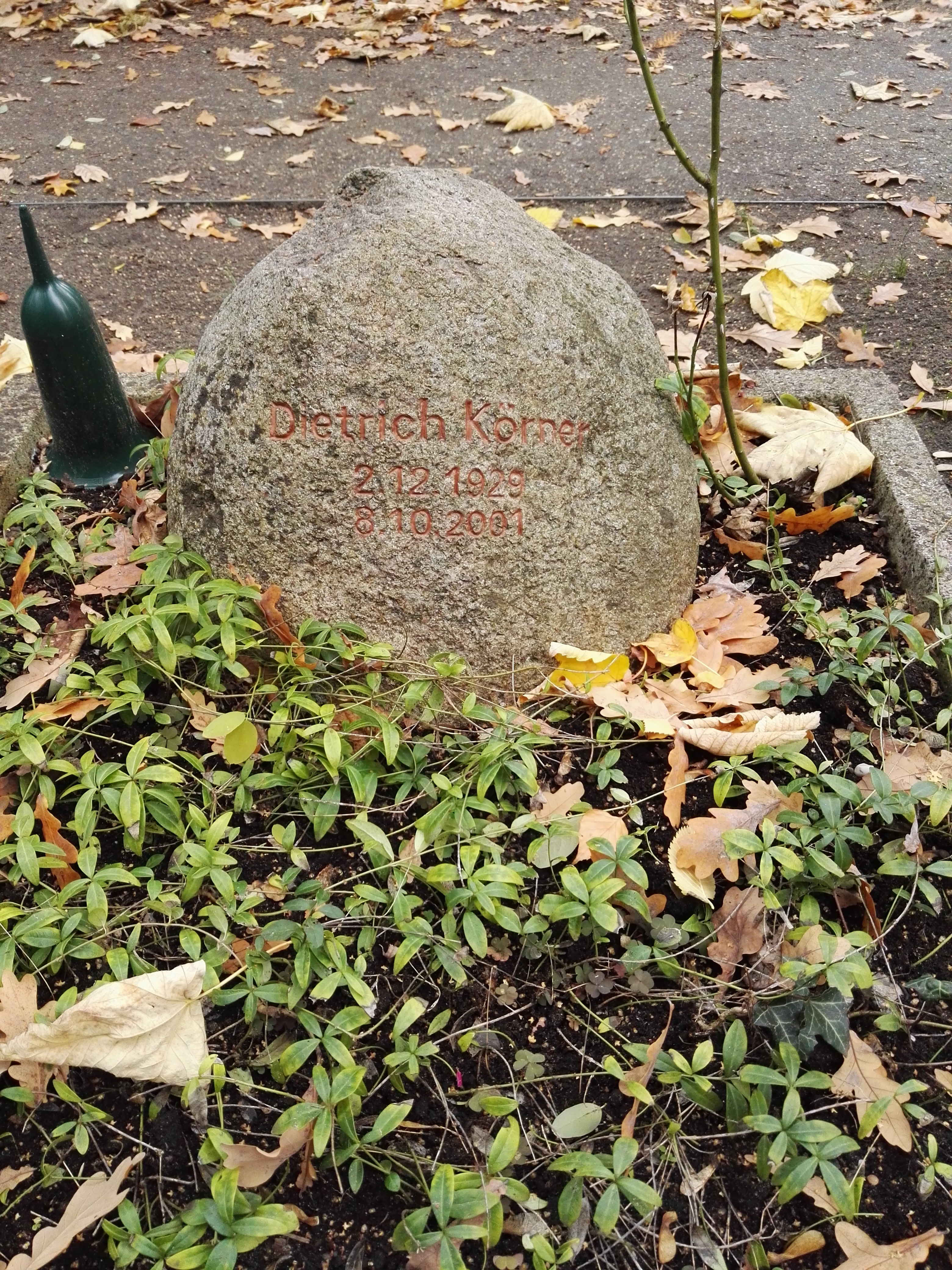 Grab von Dietrich Körner auf dem Friedhof der Dorotheenstädtischen und Friedrichswerderschen Gemeinden in Berlin-Mitte